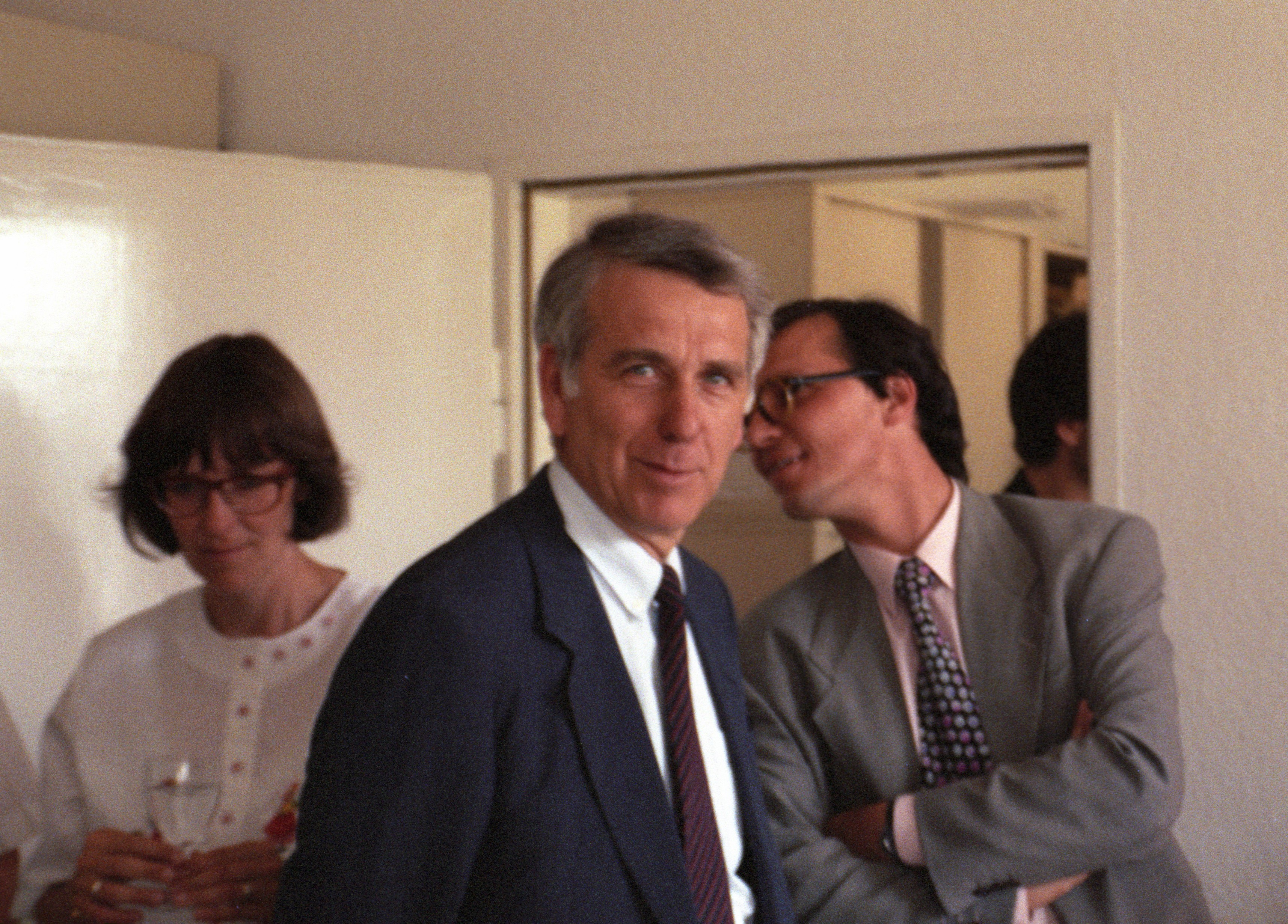 Klaus Berg, Personalchefin Petra Ertel und Programmchef Volker Herres auf einem Empfang des Norddeutschen Rundfunks